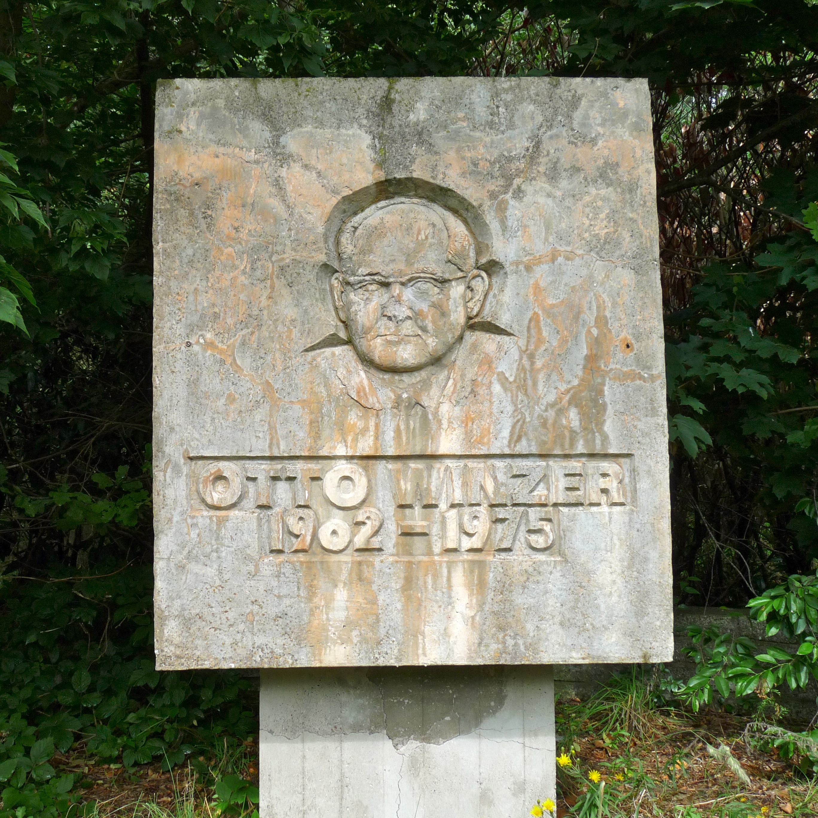 Gedenkstein für den deutschen Politiker Otto Winzer (1902 – 1975) am Eingang der nach ihm benannten, ehemaligen Offiziershochschule der NVA für ausländische Militärkader in Prora auf der Insel Rügen.